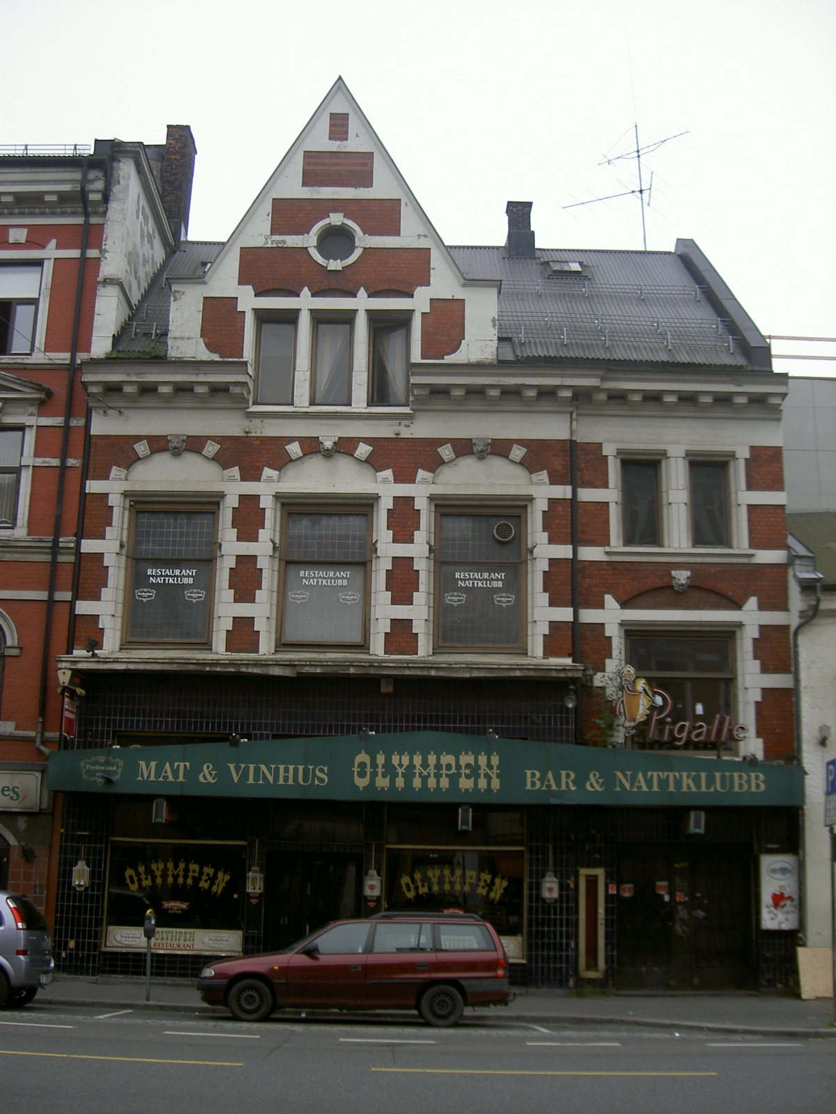 «Olympen» restaurant i Oslo